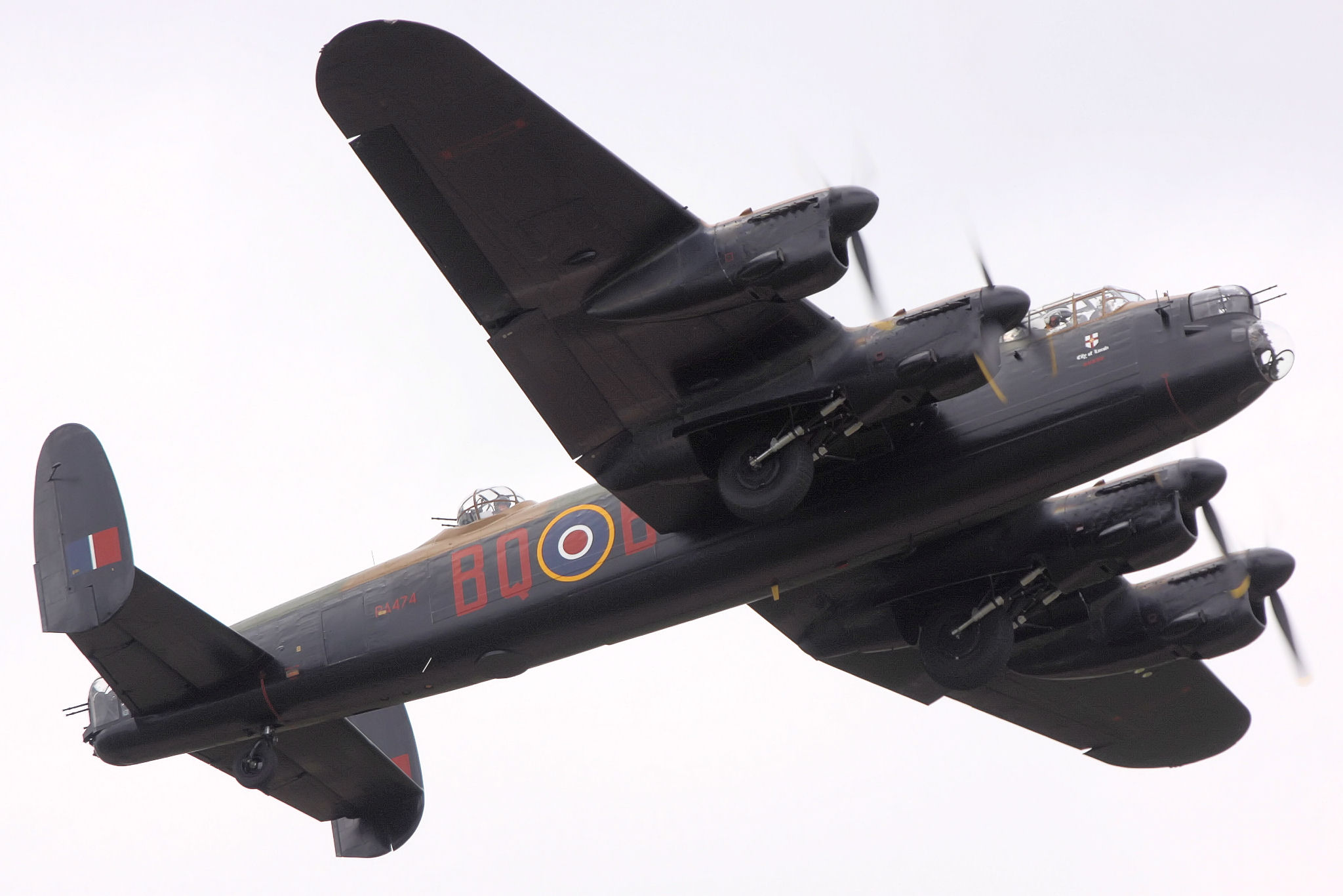 Avro Lancaster - RIAT 2009